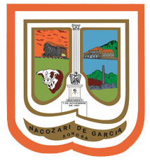 Dibujo del Escudo de Nacozari de Garcia